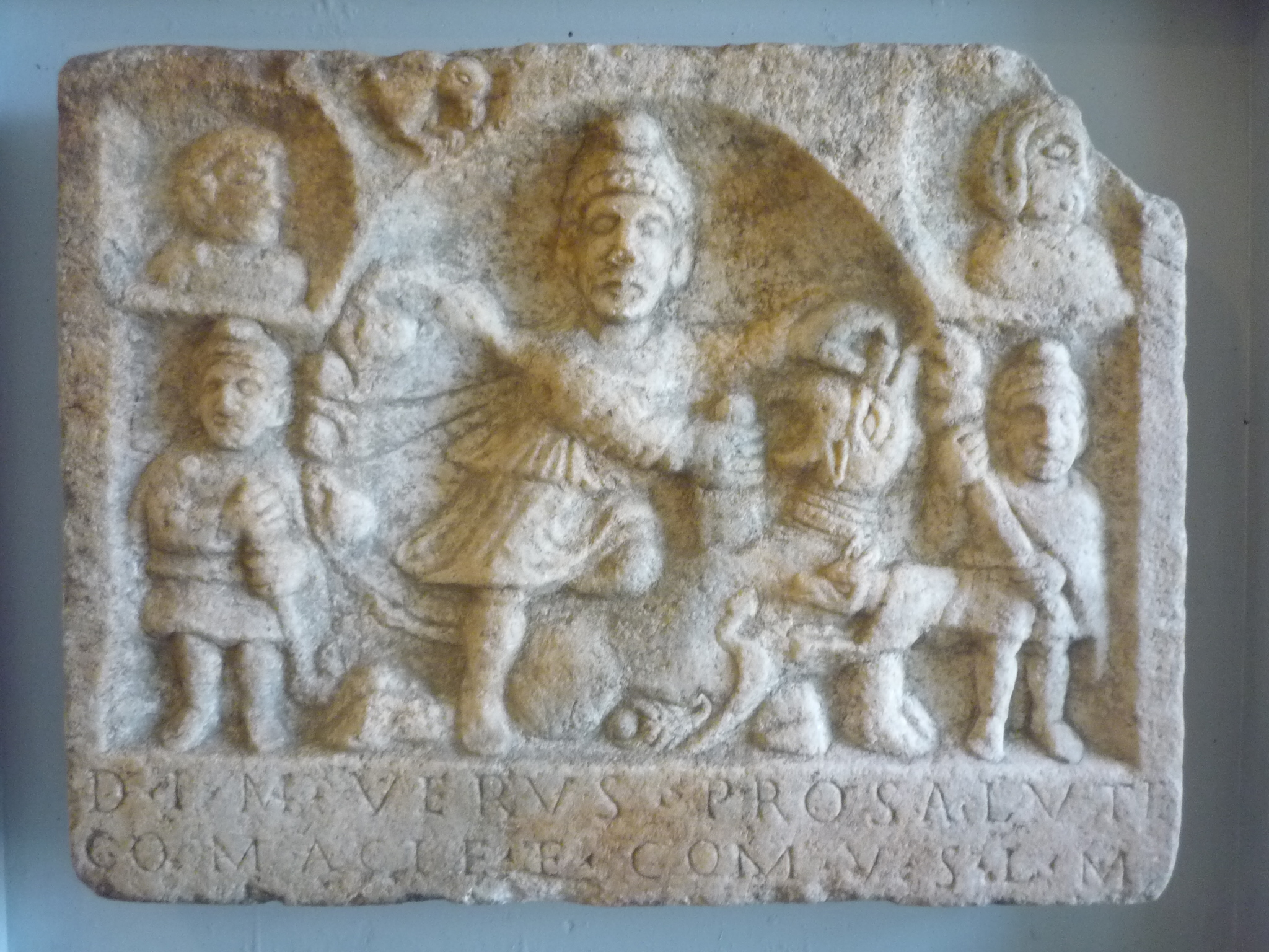 Mythrasrelief, gefunden bei St. Andrä. Ausgestellt im römischen Museum Tulln